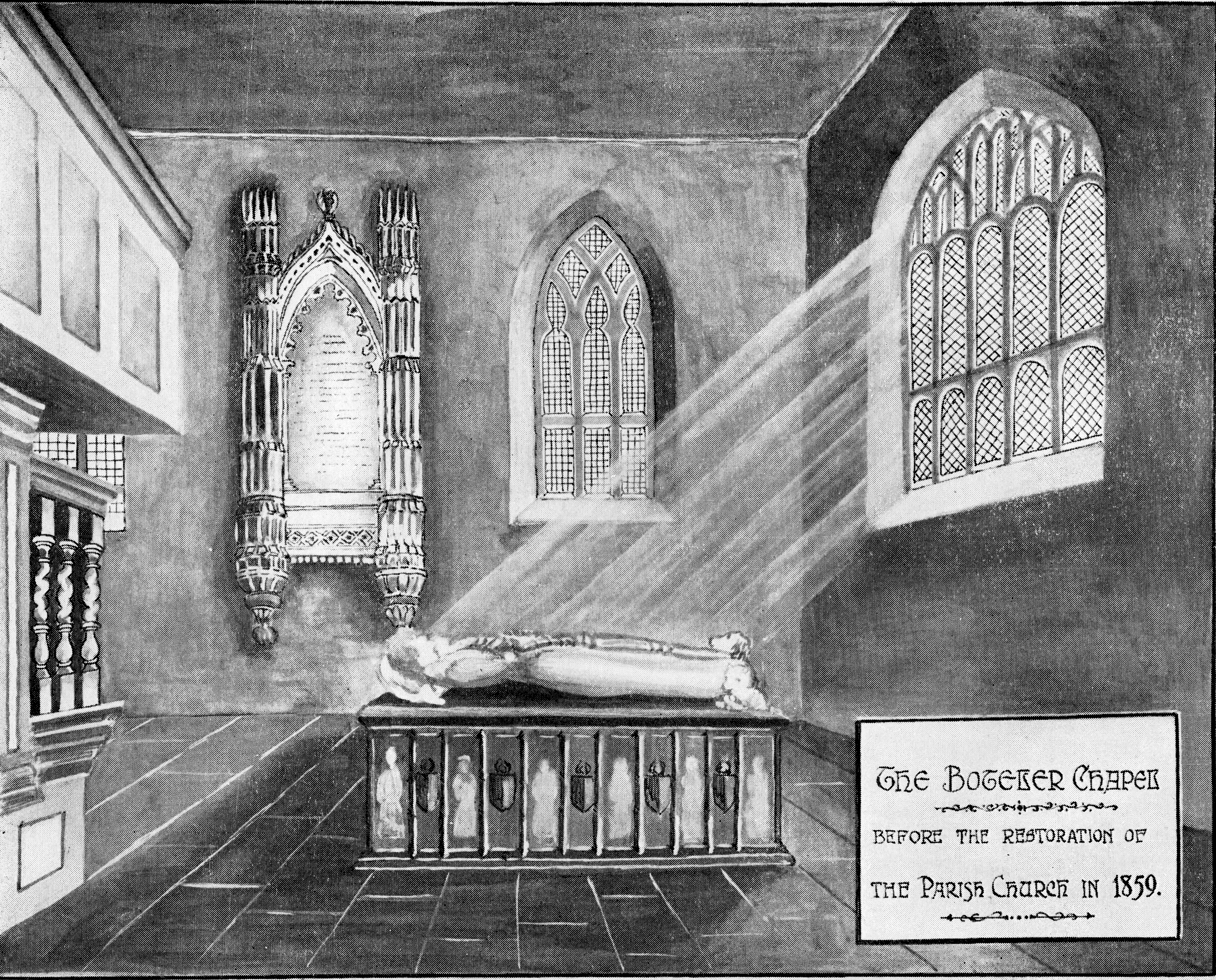 The Boteler Chapel in the Parish Church before the restauration in 1859